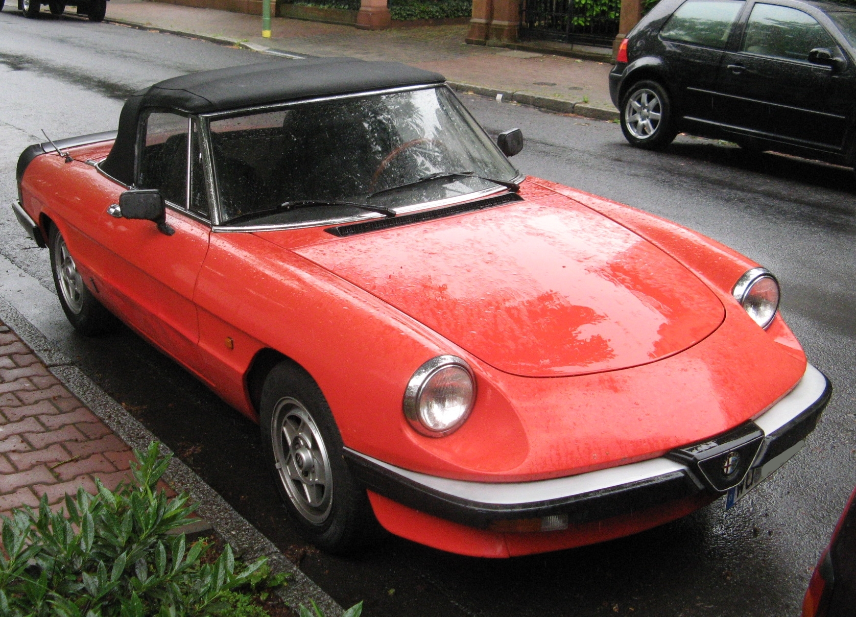 Alfa Romeo Spider 3rd generation in Frankfurt, Germany